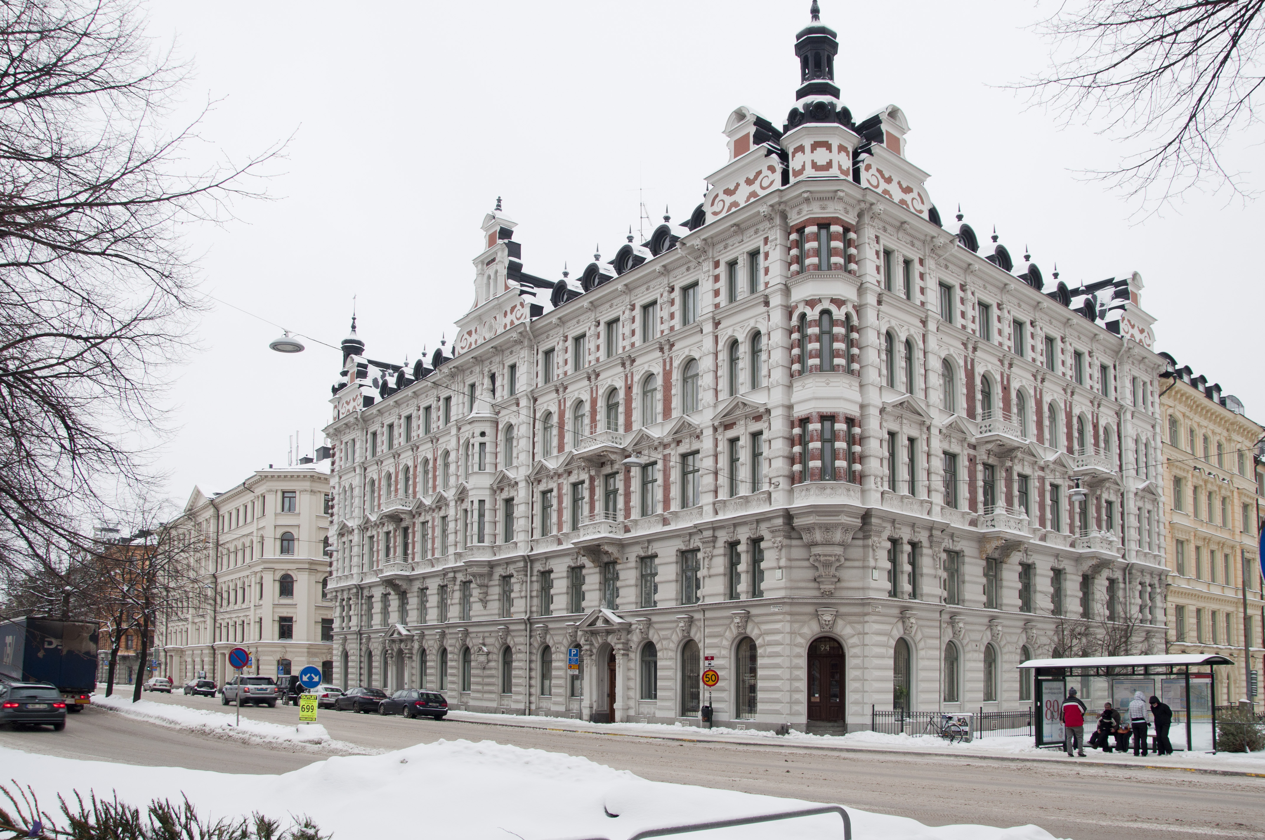 Valhallavägen 94-96, Byggnadsår 1885-86, arkitekt Fredrik Dahlberg, byggherre och byggmästare Lars Östlihn & Robert Alderin.